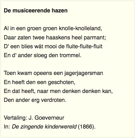 Jan Goeverneur (1809-1889), kinderliedje 'In een groen knollenland', in: "De zingende kinderwereld" (1866).